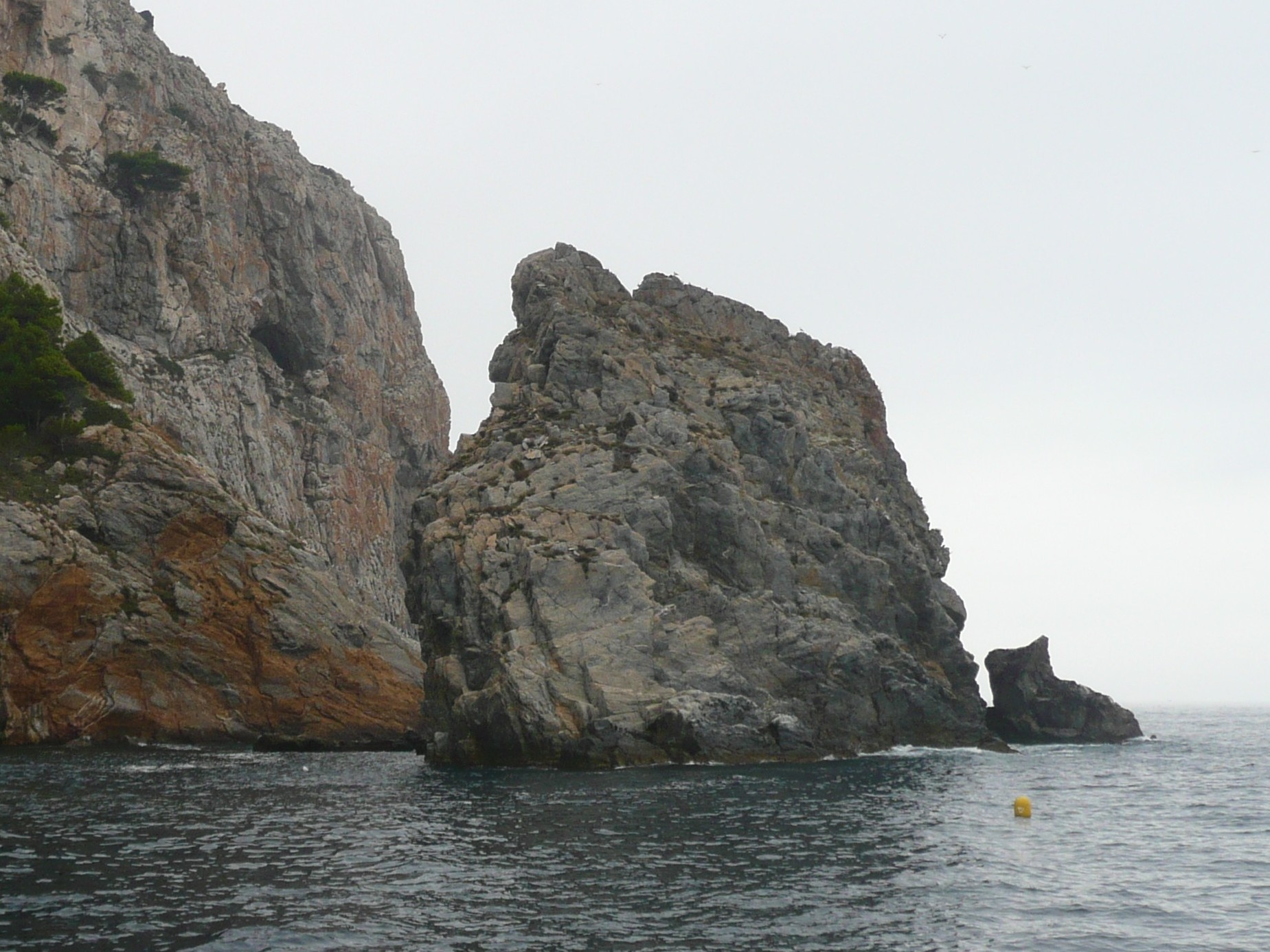 El Gat am Cap Norfeu im Nationalpark Cap de Creus - Westseite